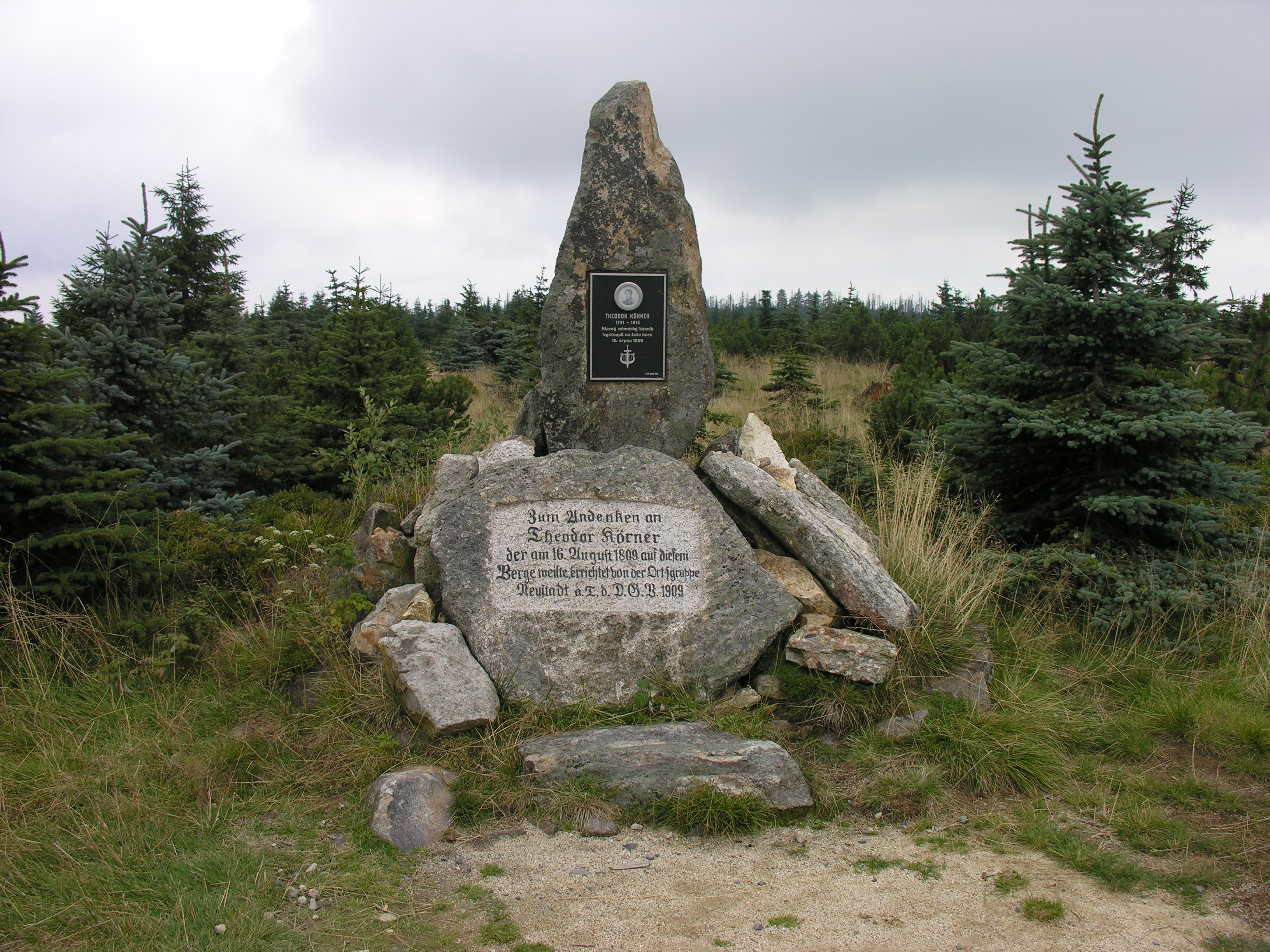 Pomnik Thodora Körnera na Smreku.